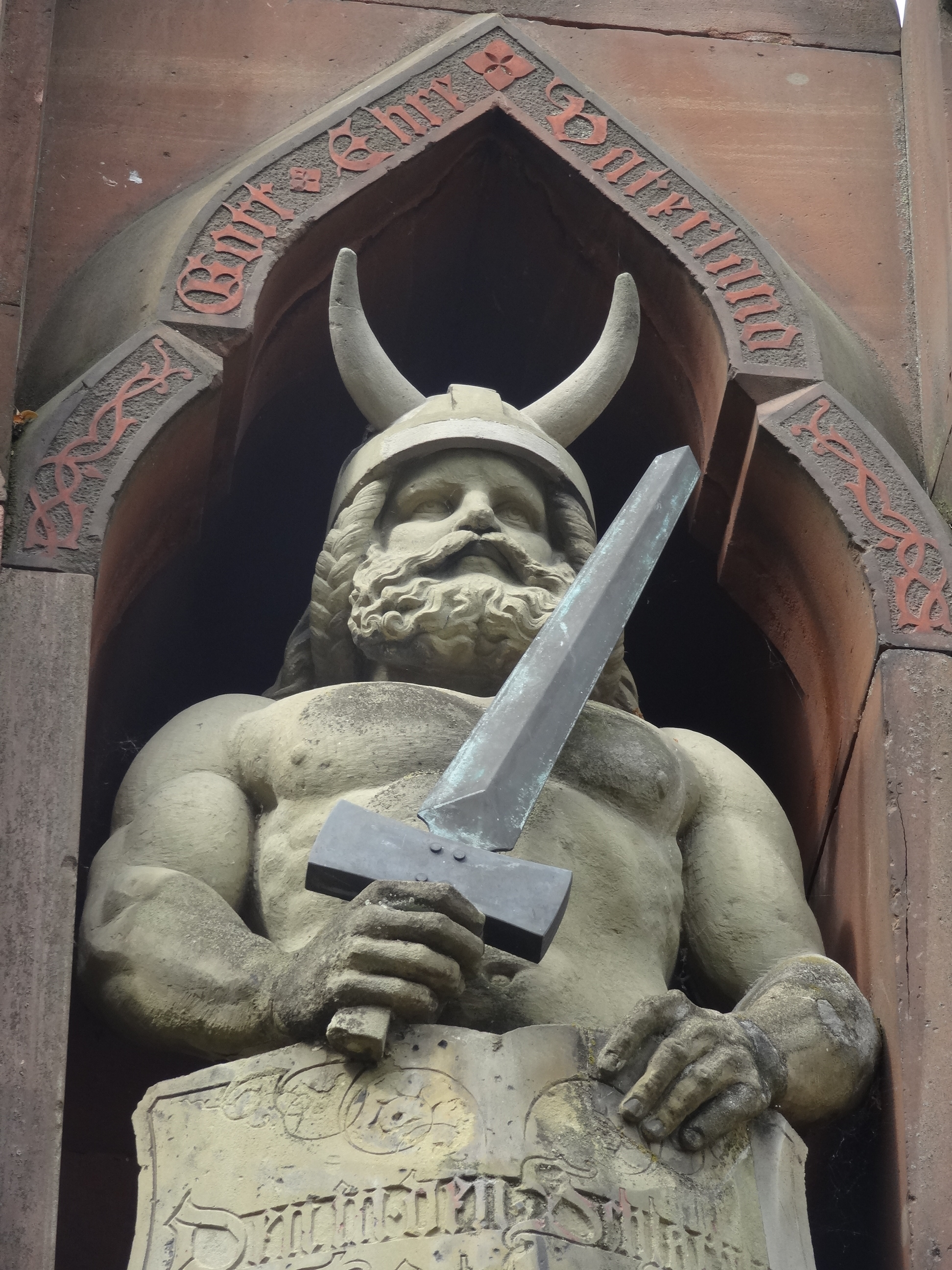 Veteranendenkmal ("Riwwel Matthes") für Gefechte an denen hessische-darmstädtische Soldaten beteiligt waren, 1792-1805, 1806-1813, 1814-1815, von Johann Baptist Scholl d. J., 1852, seit 1902 im Herrngarten Darmstadt